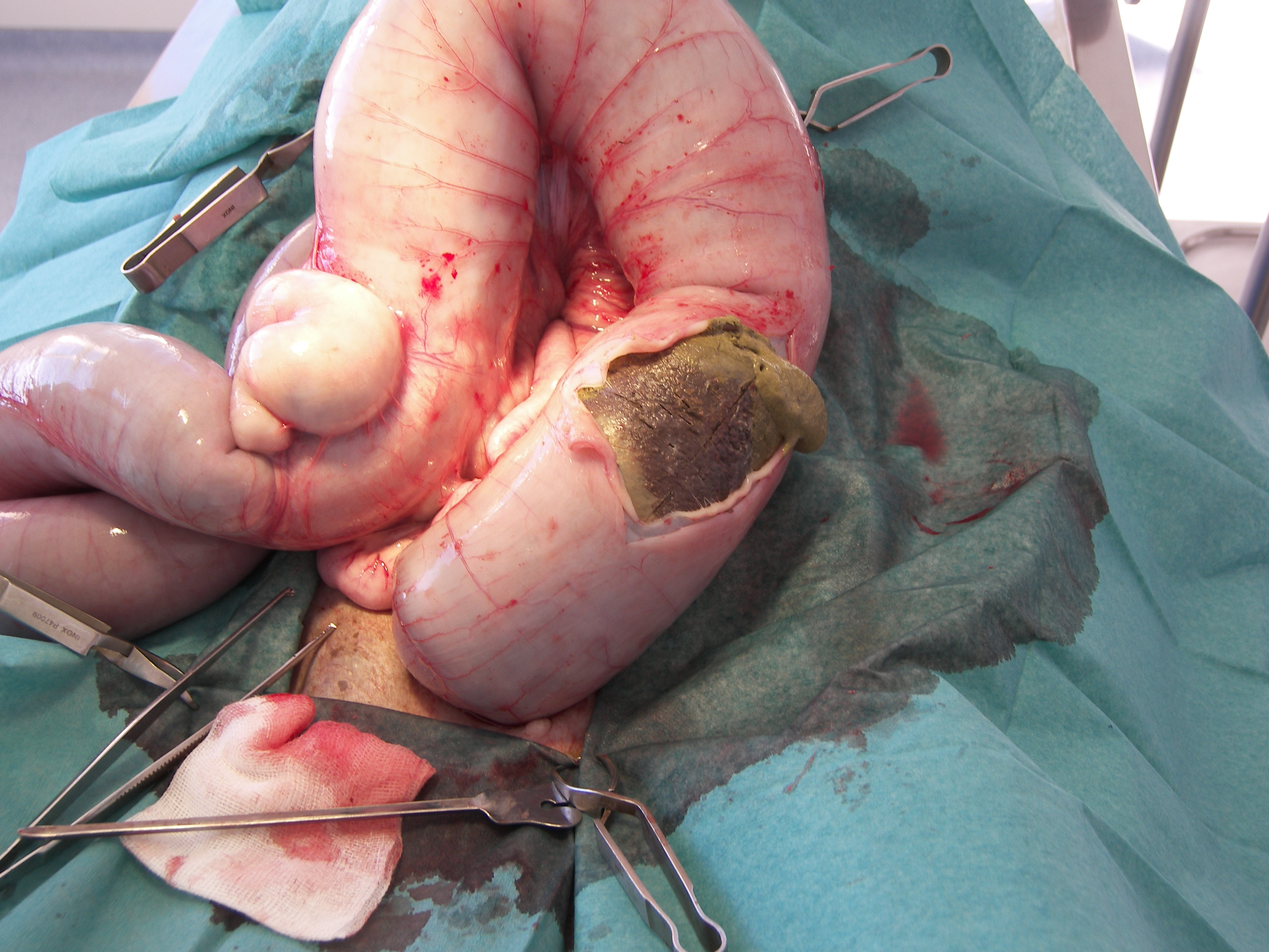 Du à l'ingestion d'os